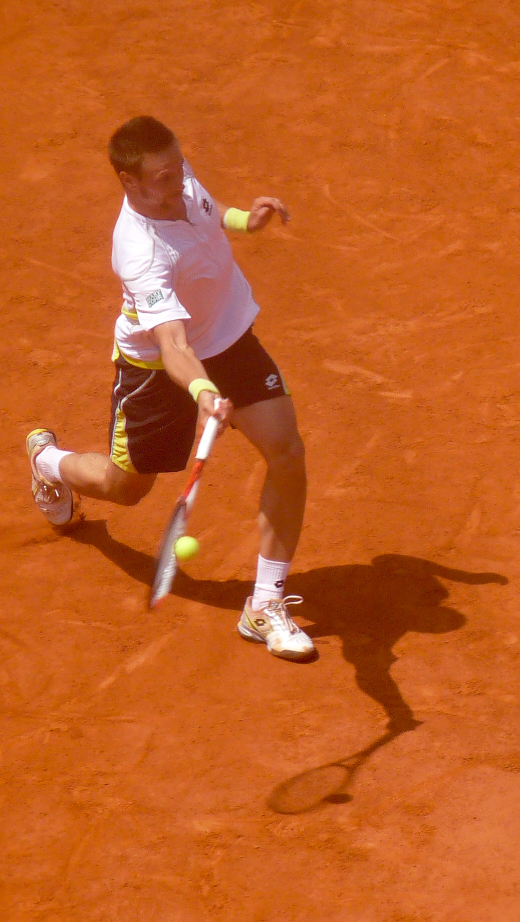 Robin Söderling against Fernando González in the 2009 French Open semifinals